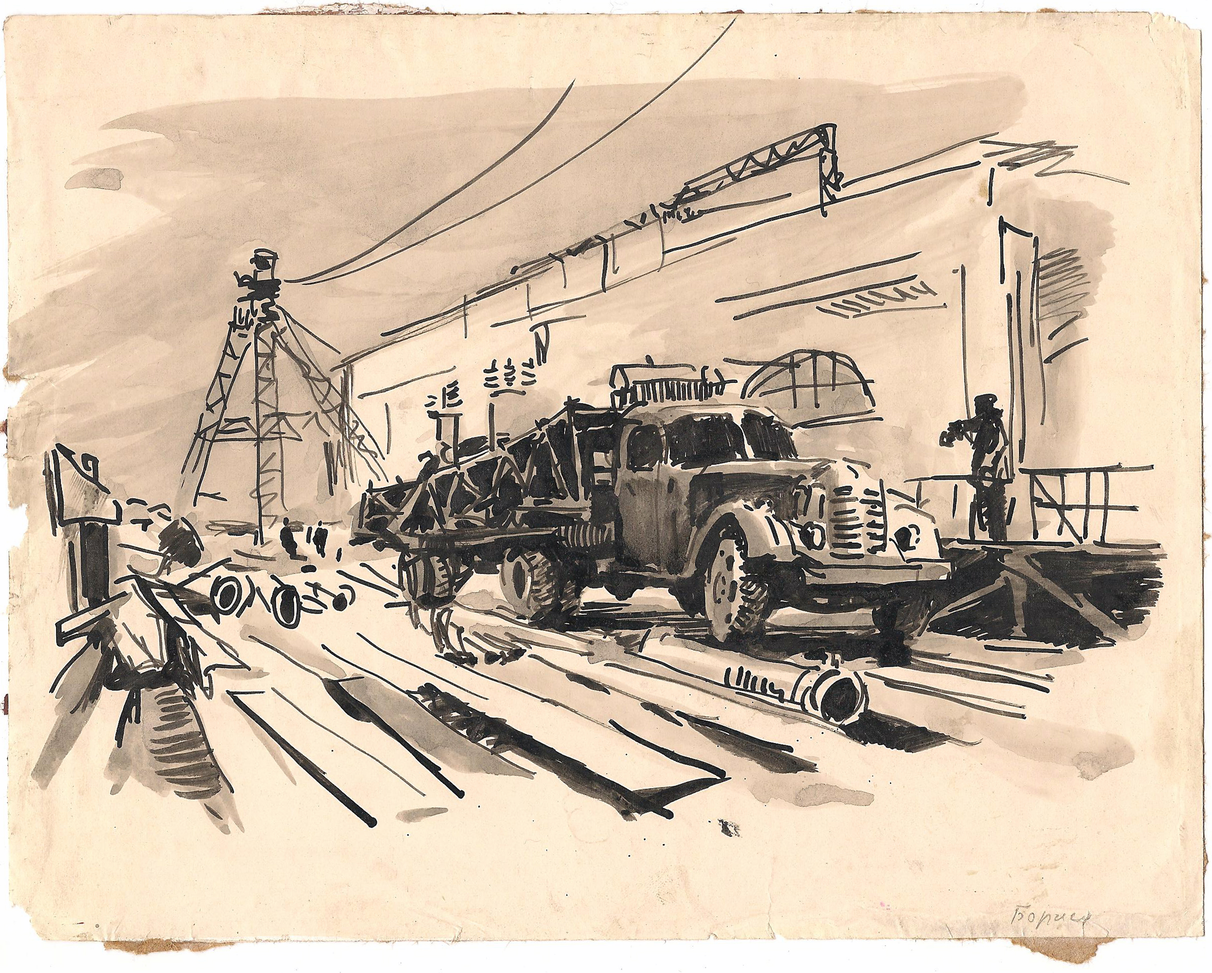 Художник Анатолий Викторович Борисов (1933–1969). Каширская ГРЭС имени Г.М. Кржижановского. Тушь, акварель. 1956. Собрание Михаила Тренихина